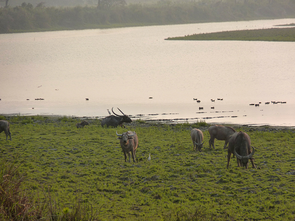 Wild Water Buffalo Bubalus arnee, Kaziranga National Park, Assam, India.